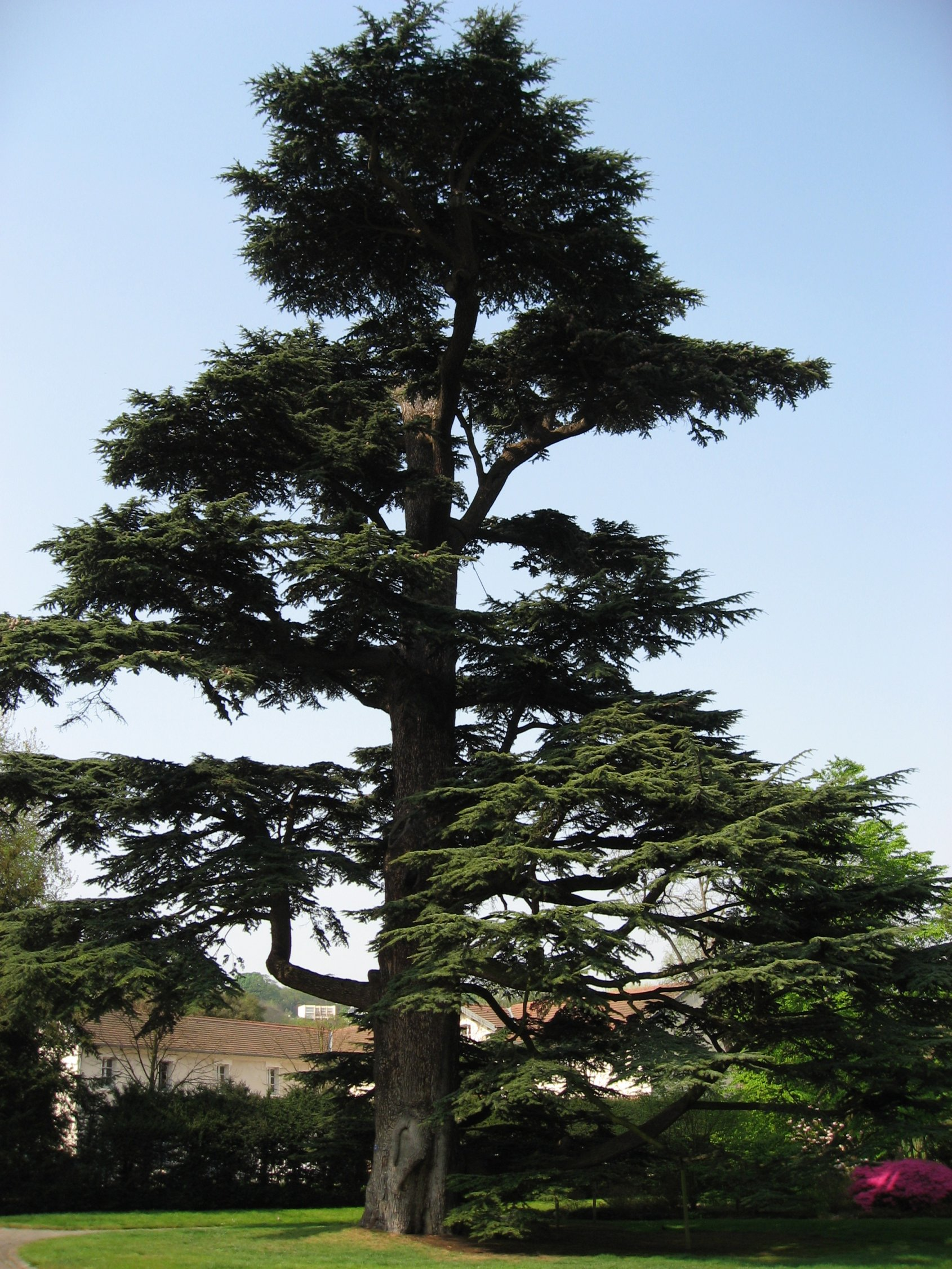 Cedrus libani planted in 1750 in Arboretum de la Vallée-aux-Loups Map: 48° 46' 22" N 2° 16' 5" E